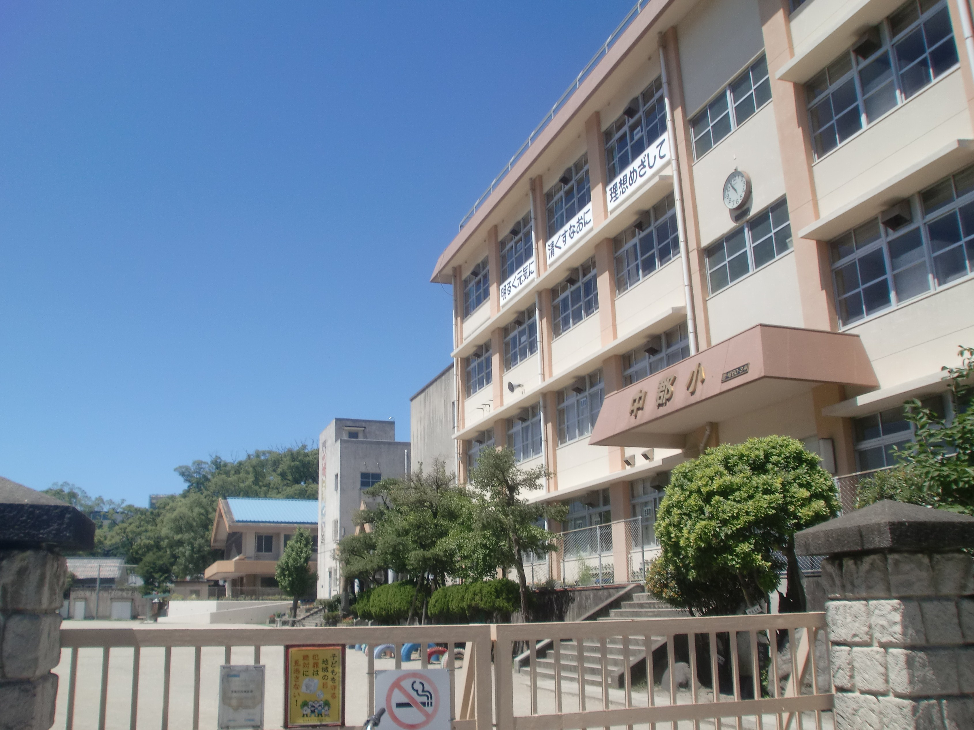 鹿児島市立中郡小学校の外観